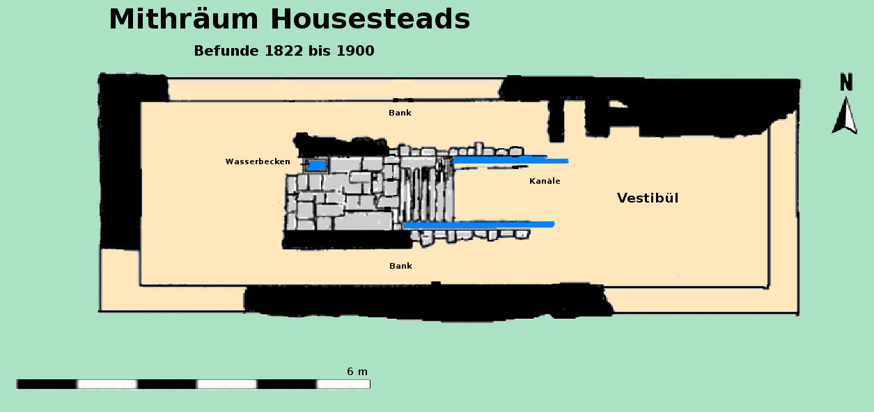 Befundplan des Mithräums von Kastell Housesteads/Vercovicium, Hadrianswall (GB).